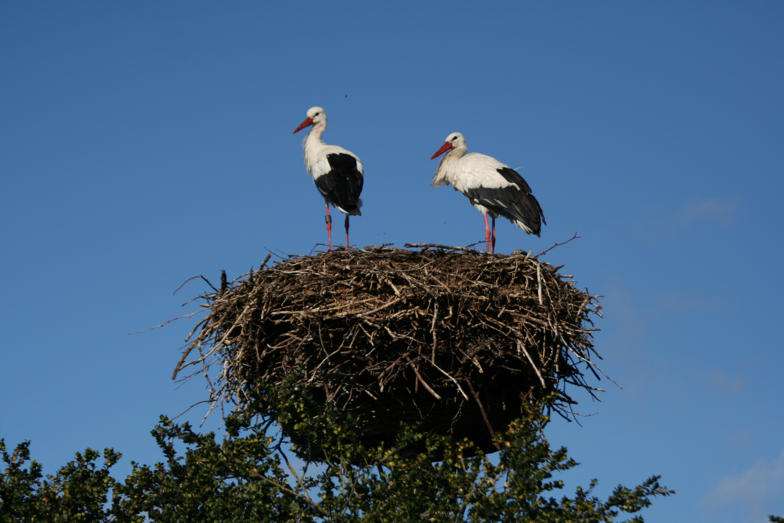 Cigognes en Alsace (Cernay, 68)